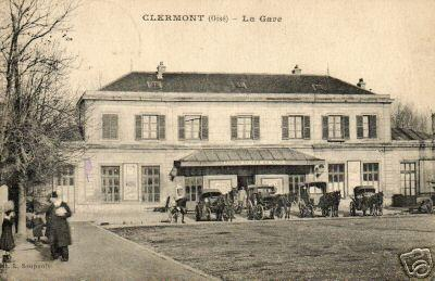 la gare au 19ème siècle